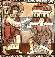 Bartimeo almozulo de la evangelio